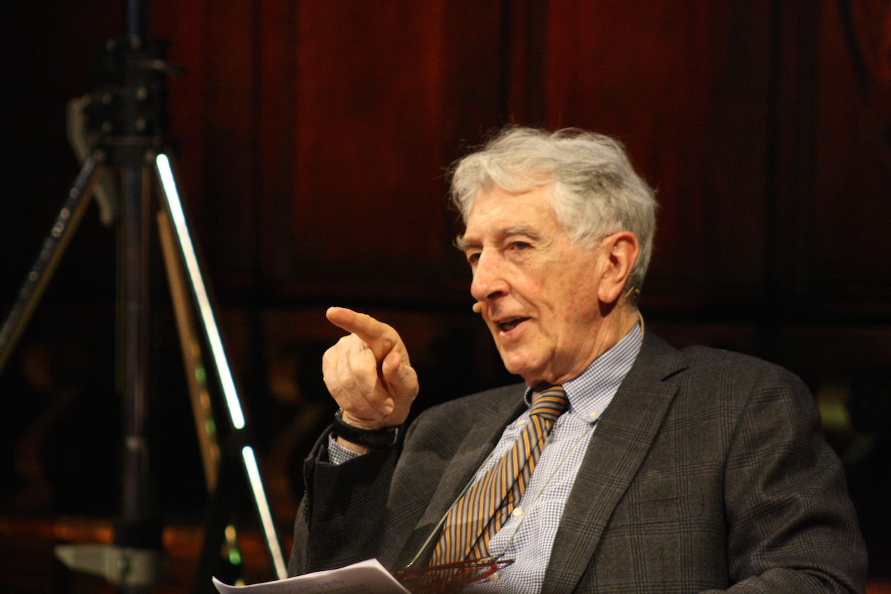 Corrado Augias. Tra Cesare e Dio. Sala dei Notari. Festival del Giornalismo di Perugia.